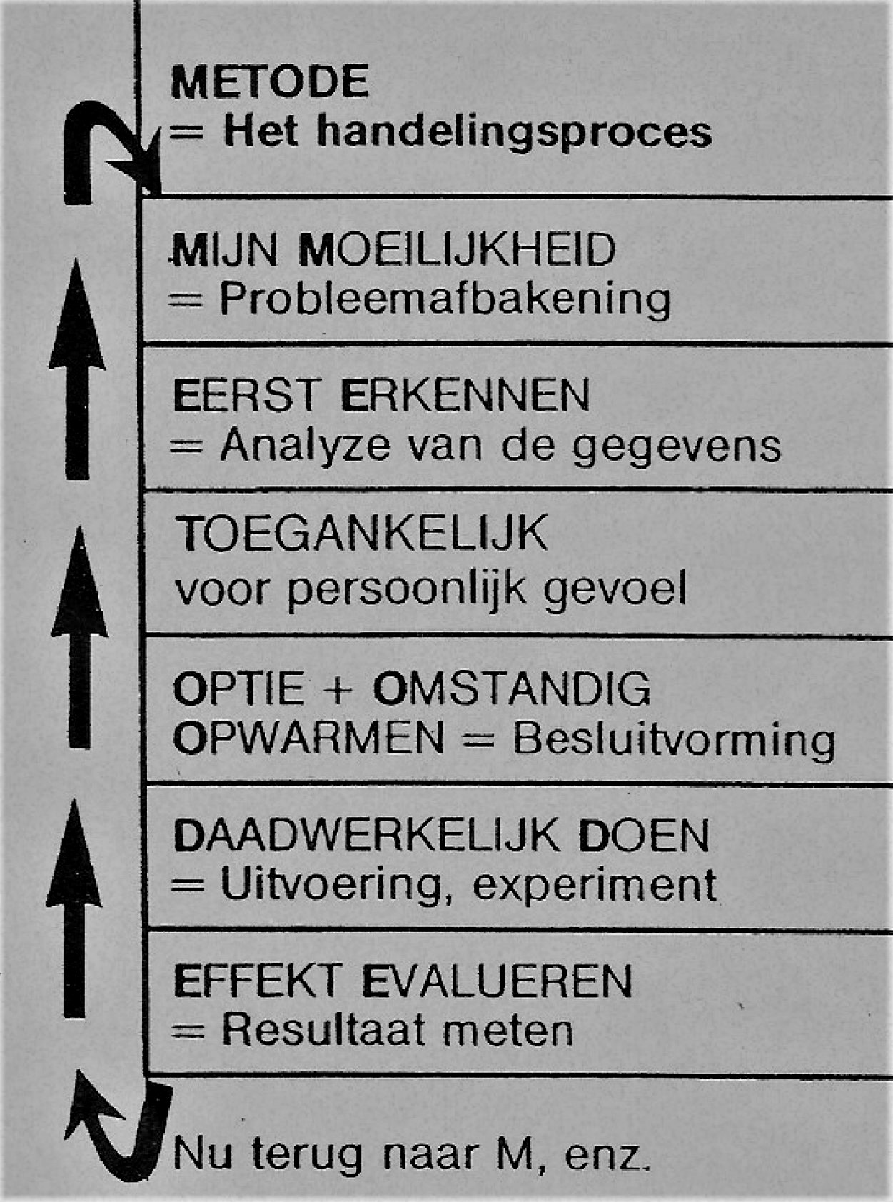 Dit instrument biedt een inzicht in de verschillende fasen van een bedding voor een kwaliteitsvoller handelingsproces.